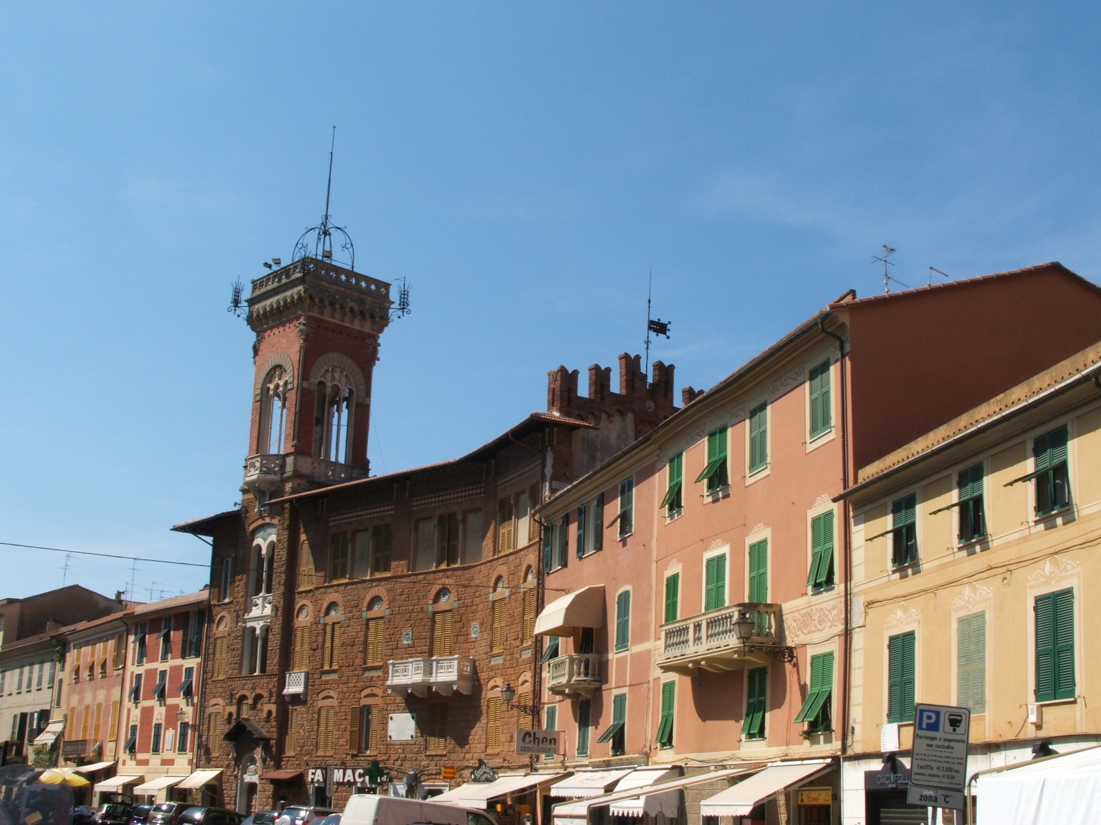 Immagine da Sestri Levante